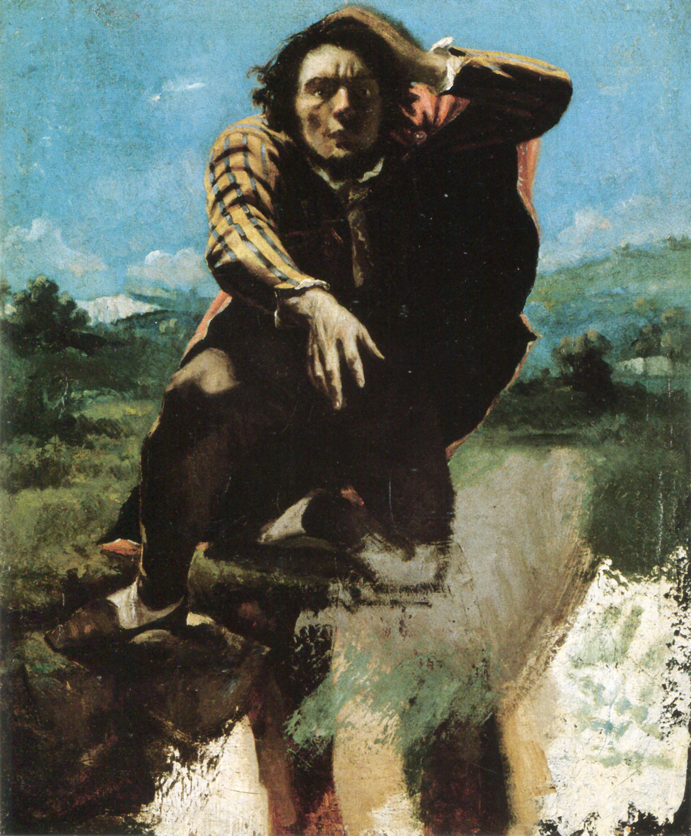 Der vom Wahn getroffene Künstler droht in eine nicht fertiggemalte Unterwelt zu stürzen